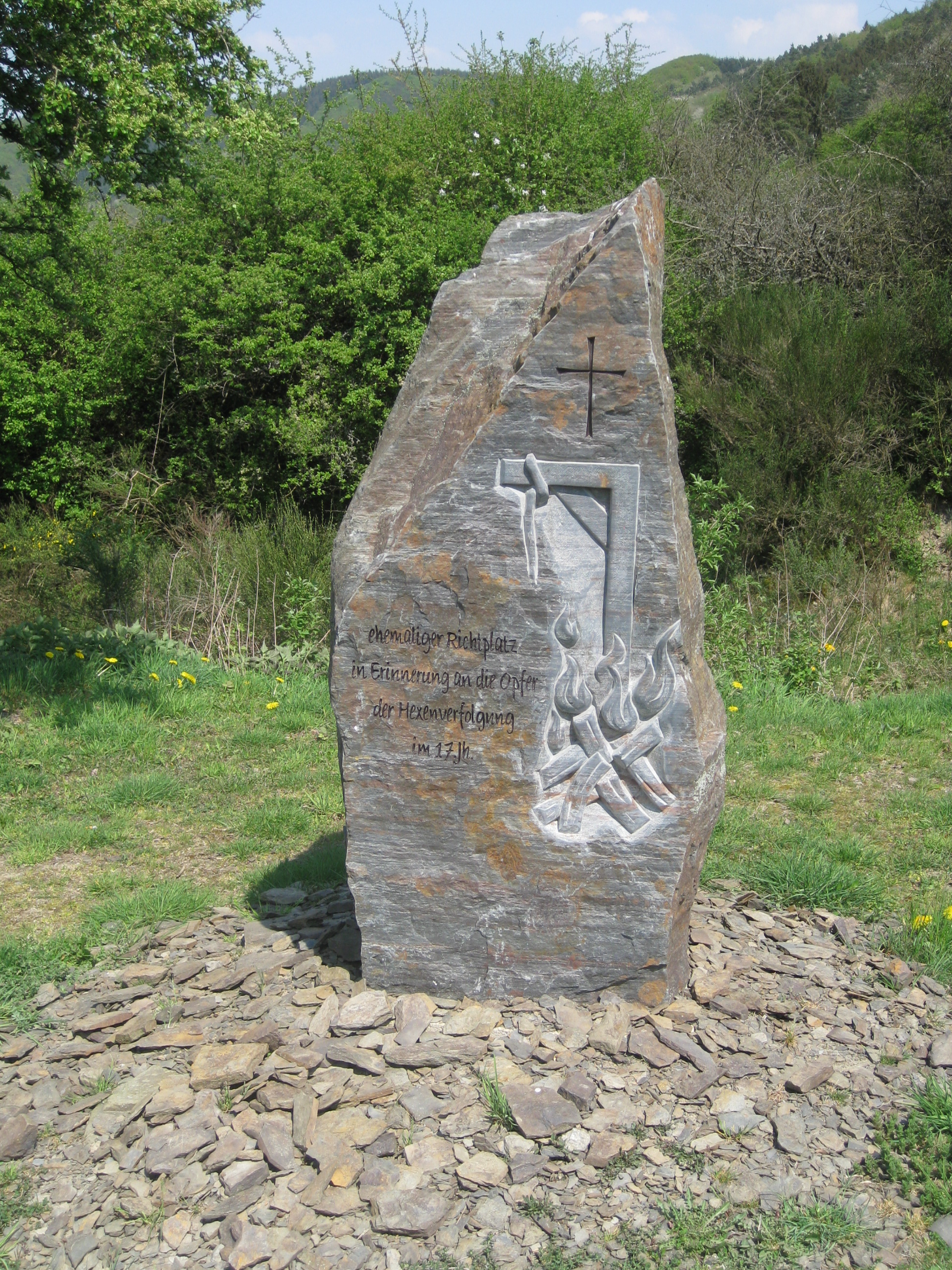 Hexendenkmal an der Silvesterhütte in Ahrbrück im Landkreis Ahrweiler in Rheinland-Pfalz.